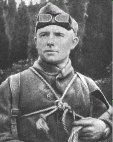 Довоенное (до 1941 года) фото известного советского альпиниста Евгения Михайловича Абалакова